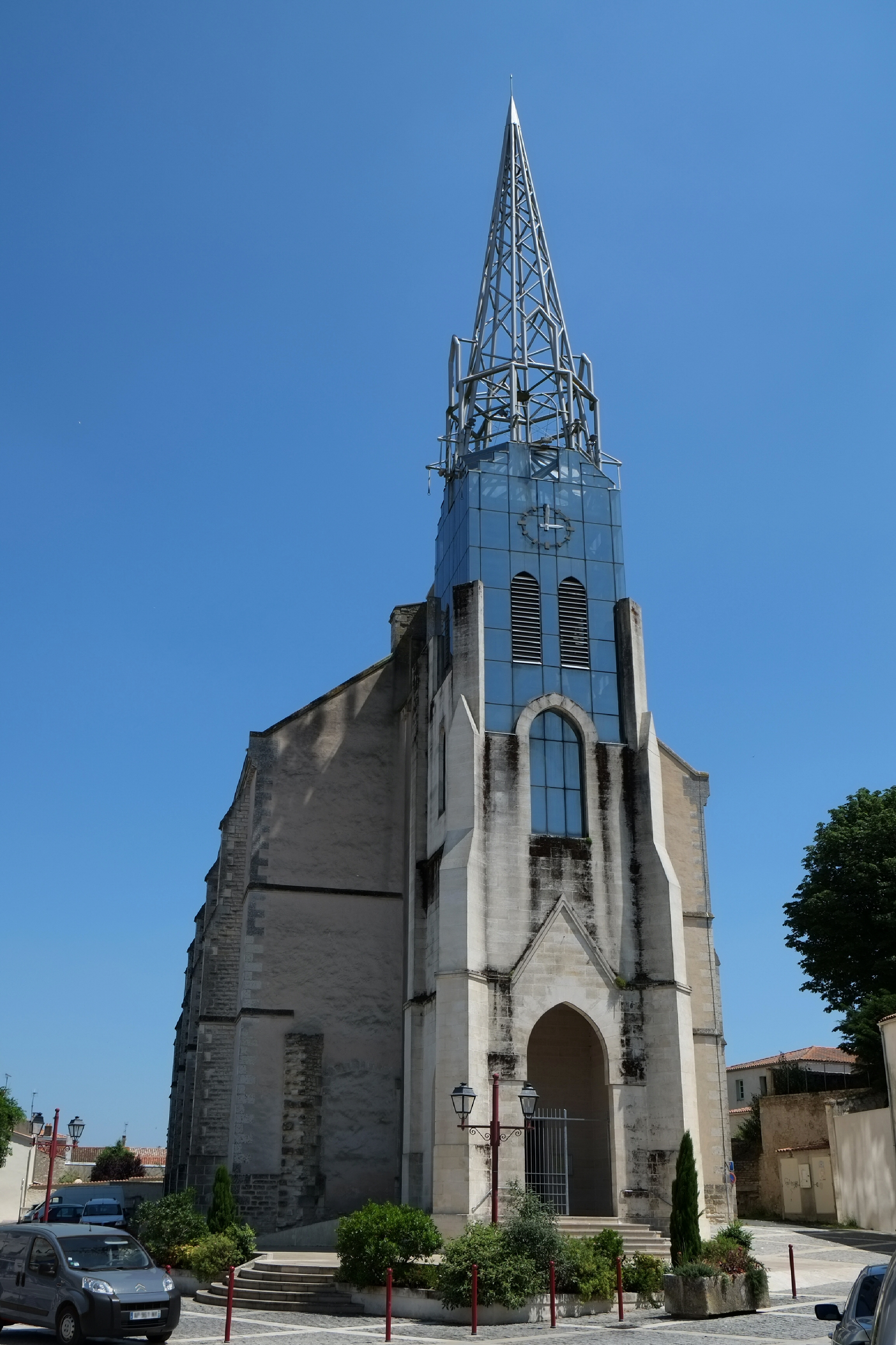 Église Notre-Dame de l'Assomption Marans Charente-Maritime France